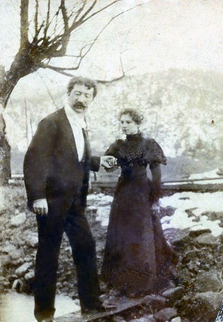 З особистого архіву Зрайка Богдана (правнук Томи Головацького)